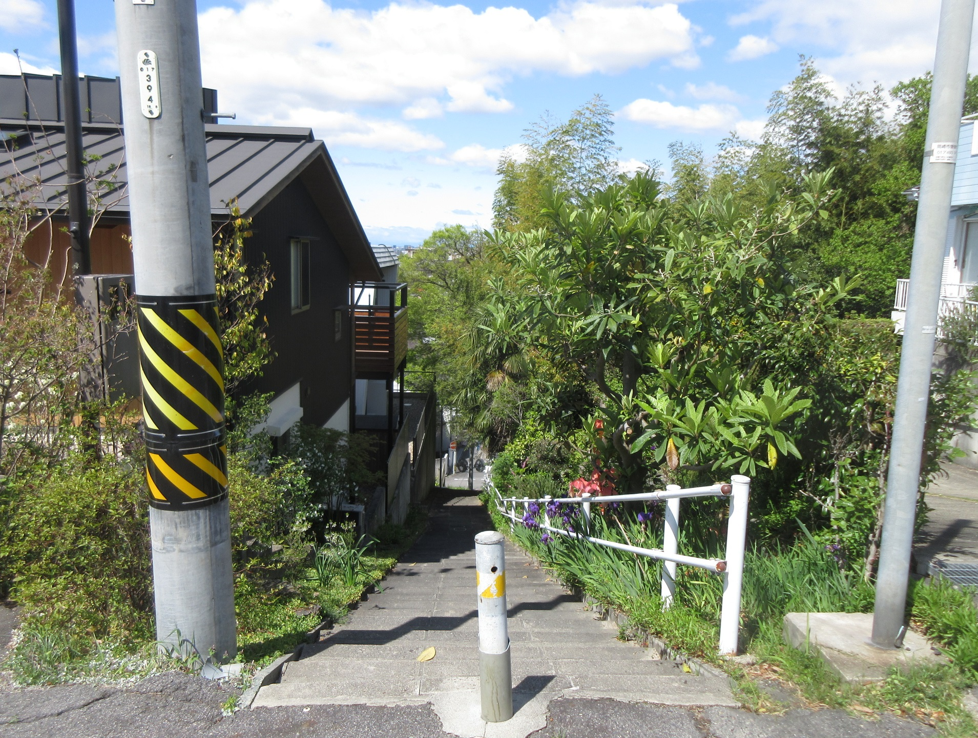 岡崎市梅園町の長い階段